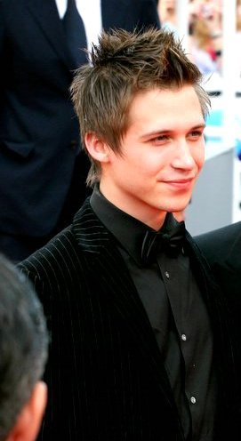 Joffrey Verbruggen au Festival de Cannes